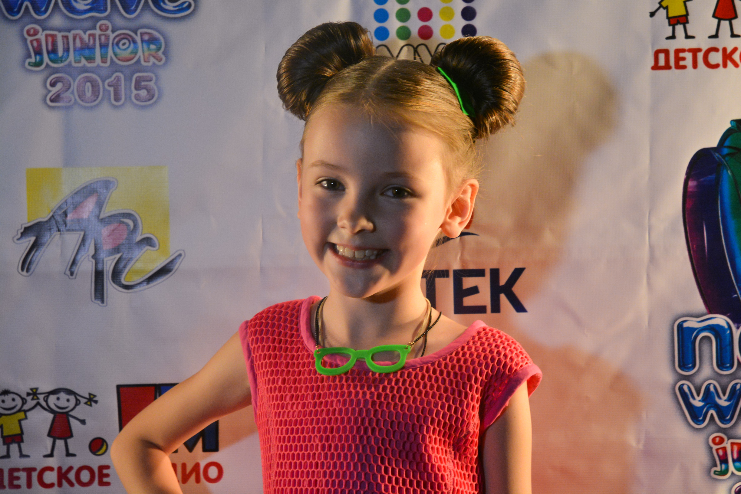 Данэлия Тулешова на Детской Новой волне 2015